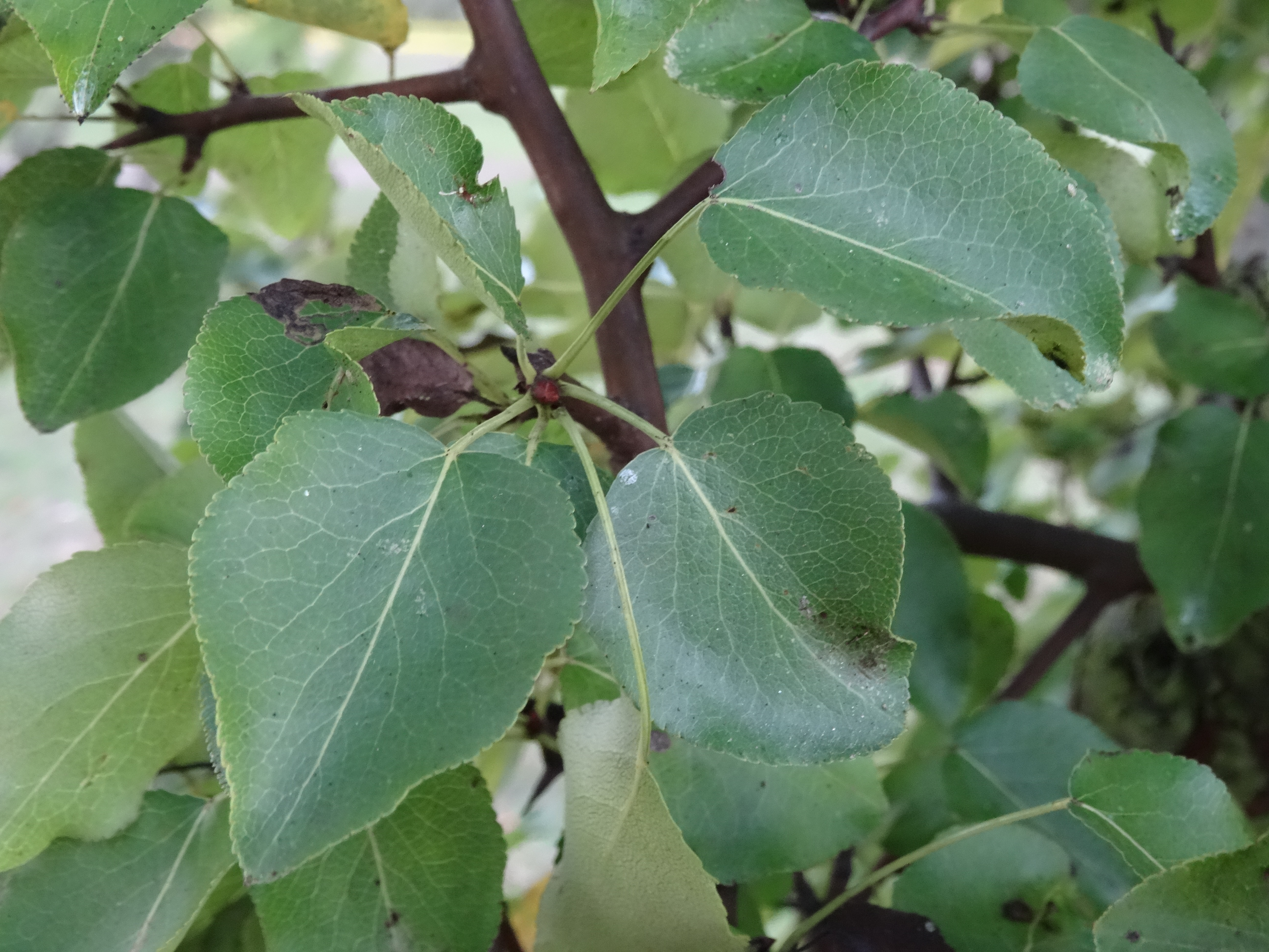 Ver título.